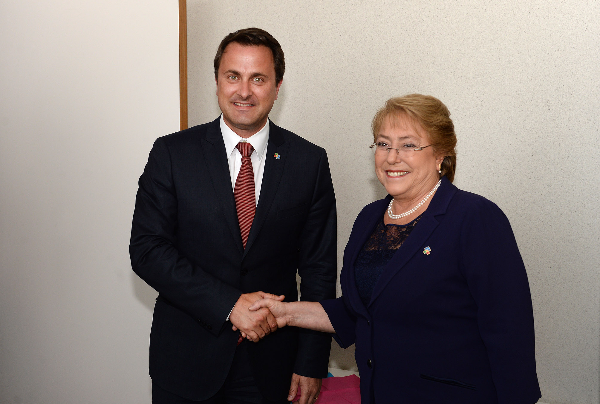 Gobierno de Chile